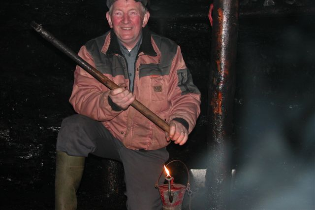 Coalmine, Hvalba, Faroe Islands